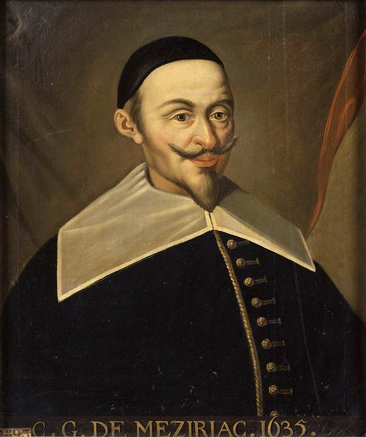 Claude-Gaspard Bachet de Meziriac (1581-1638), mathématicien, poète et traducteur français